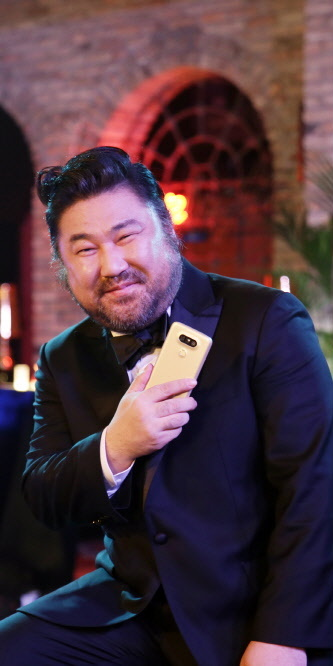 명품 ‘씬 스틸러’들이 전하는 ‘G5’의 매력 ■ 4日 ‘LG G5’ 새로운 TV 광고 On Air ■ 고창석, 예지원, 김상호, 조재윤, 문정희, 김희원 등 ‘씬 스틸러’ 배우 6명 출연 ■ G5의 매력을 배우들의 명연기와 에피소드에 담아 즐거움 선사 ※ Social LG전자 ( 에서 관련 보도자료를 확인하실 수 있습니다.